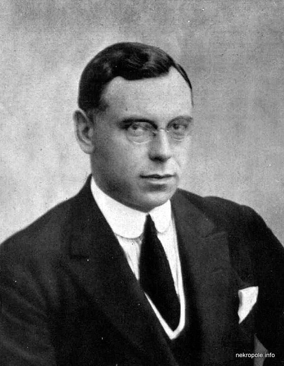 Зигфрид Анна Мейеровиц